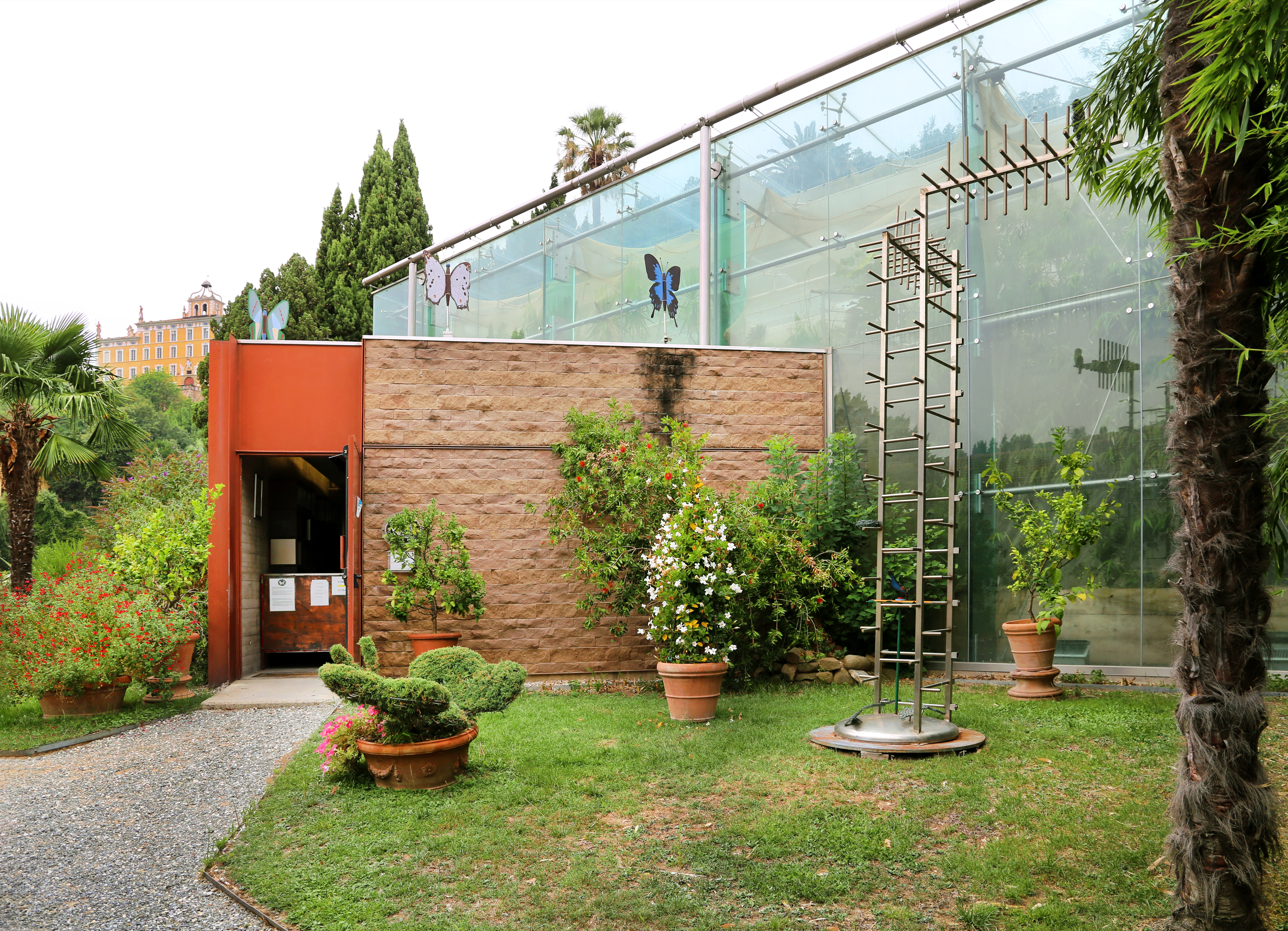 Collodi Butterfly house This is a photo of a monument which is part of cultural heritage of Italy.